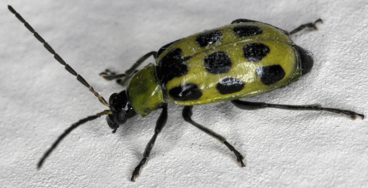 Spotted cucumber beetle (Diabrotica undecimpunctata)